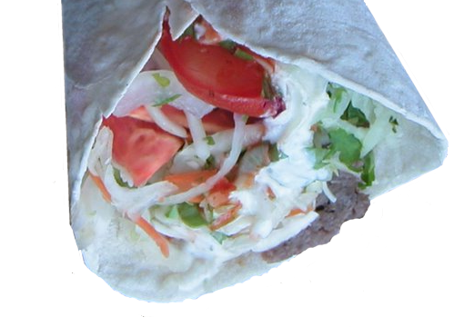 En shawarma.